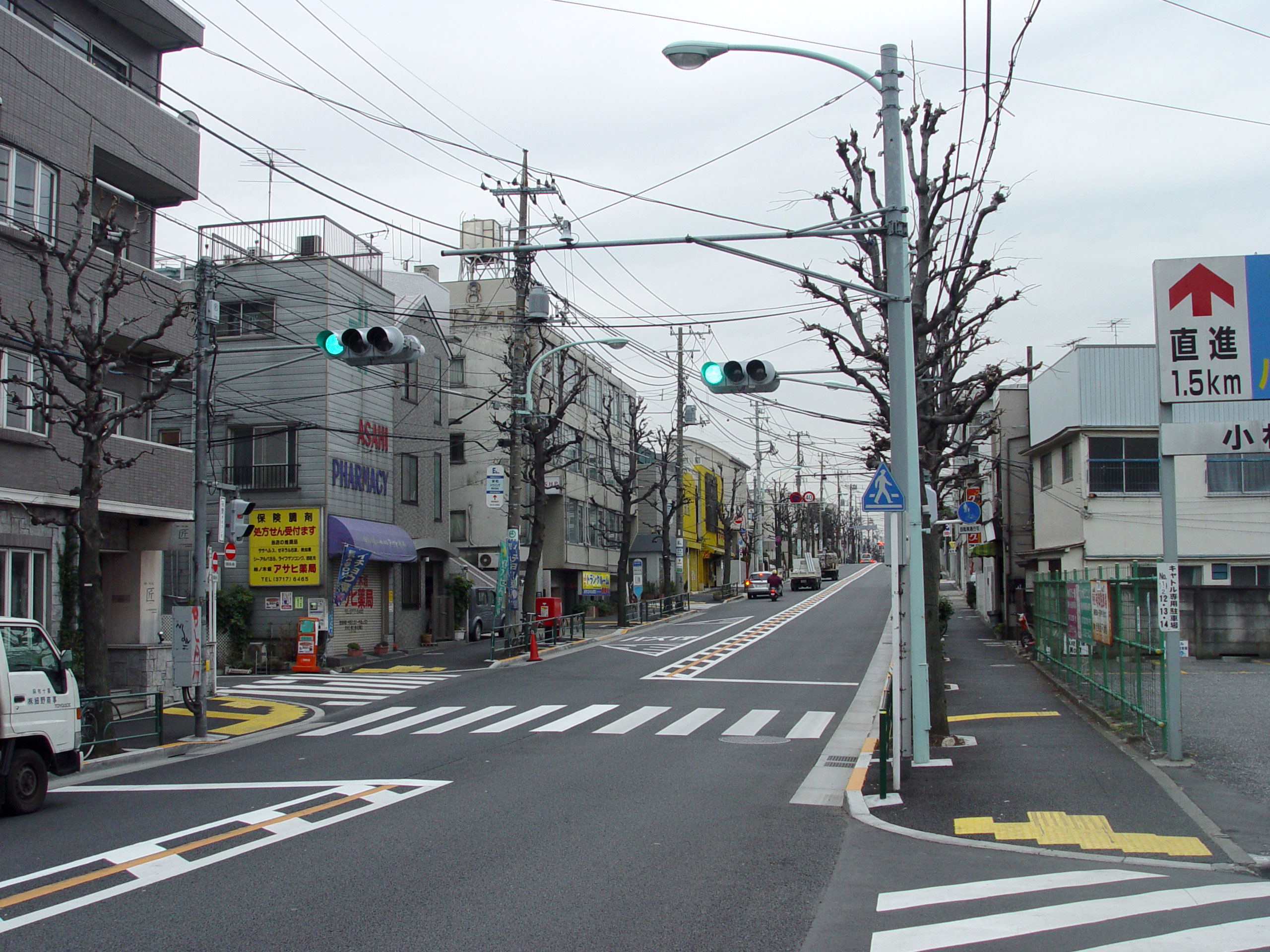 Komazawa Street in Kakinokizaka, Meguro, Tokyo, Japan目黒区柿の木坂を貫く駒沢通り